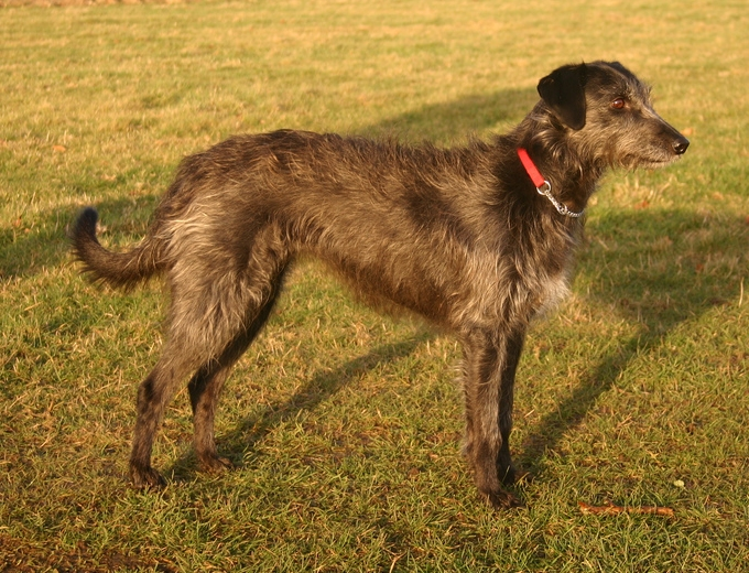 Lurcher